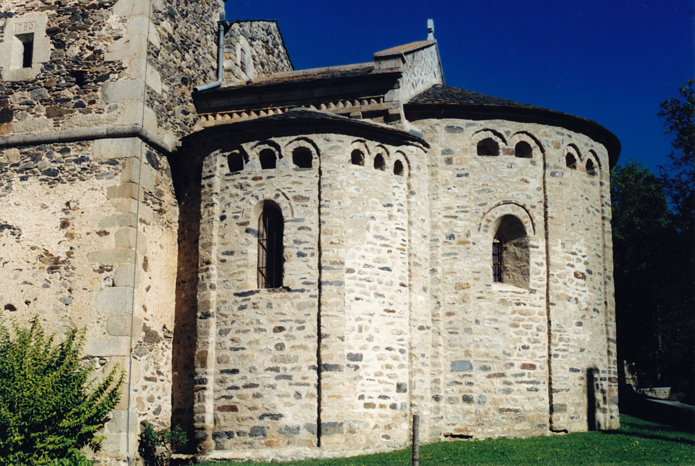 Església de Sant Martí d'Ur (Alta Cerdanya)